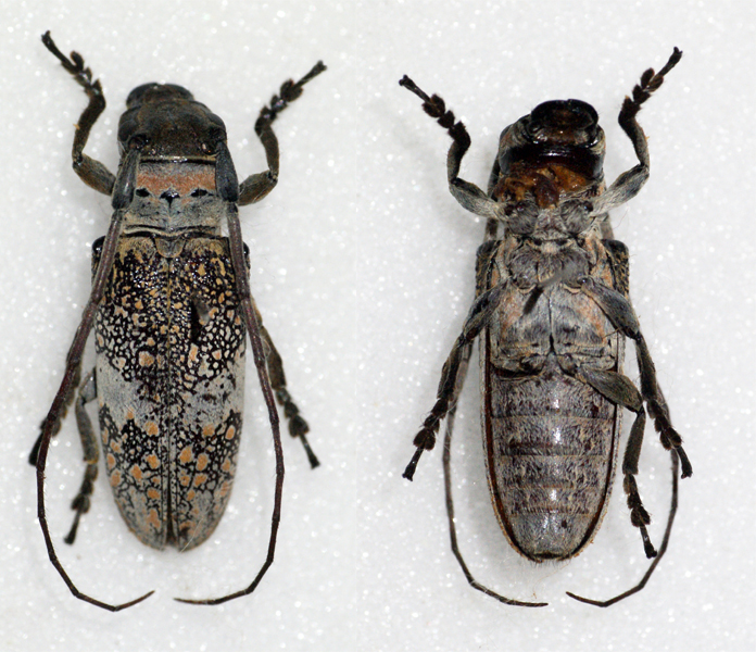 Lucas,1859 Sex: Male Data: 12-2010 - Dos de mayo - Argentina Size: ?